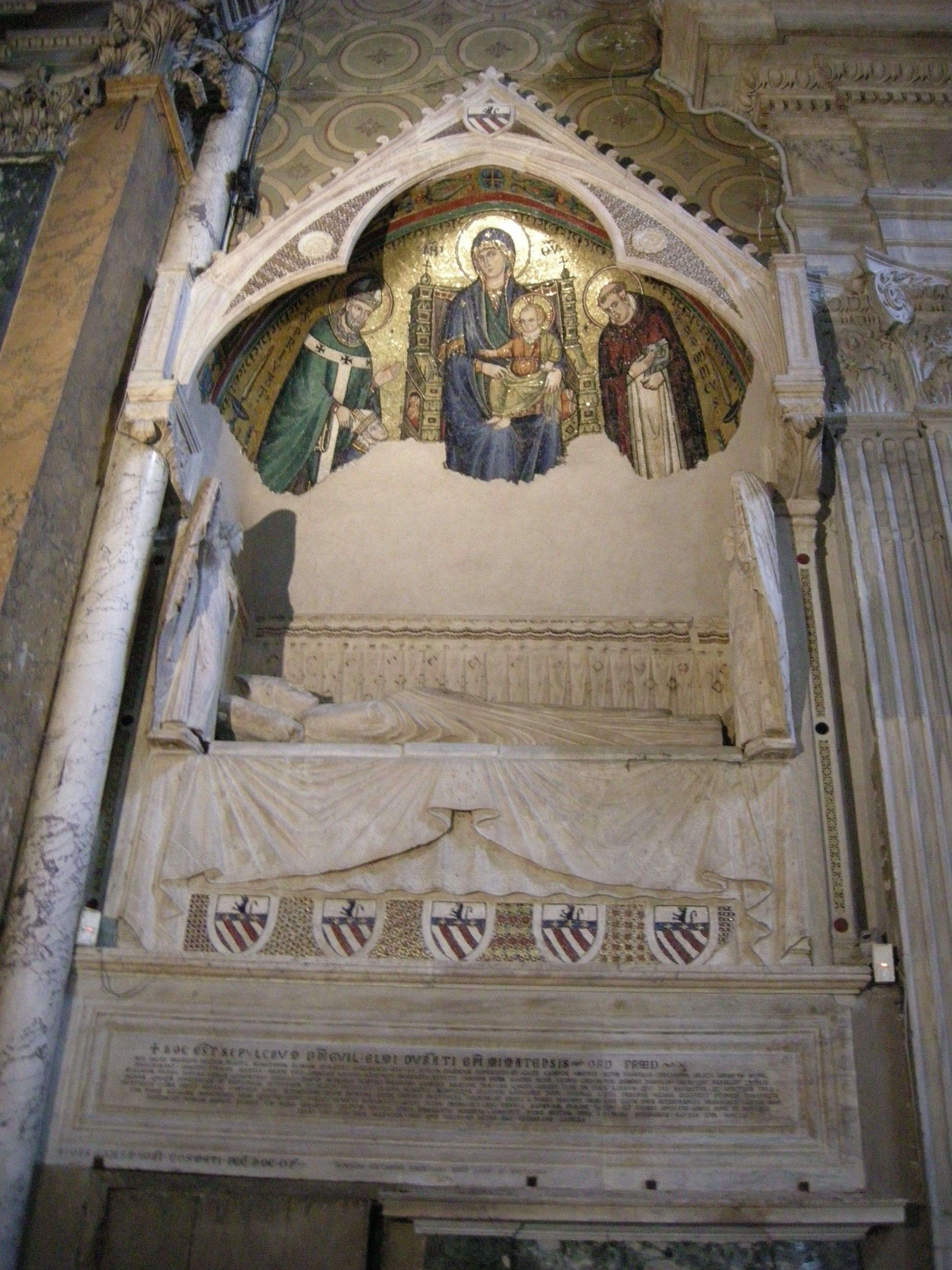 Giovanni di Cosma, tomba di Guglielmo Durand, Vescovo di Mende (1296 ca)